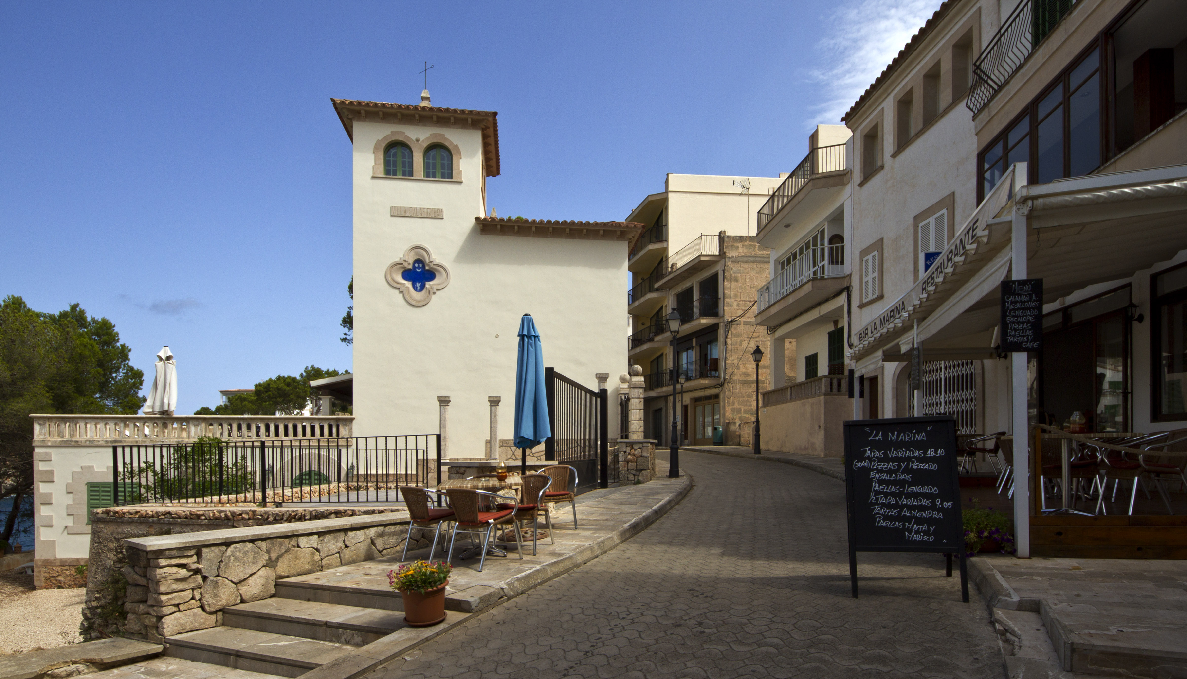 07659 Cala Figuera, Illes Balears, Spain